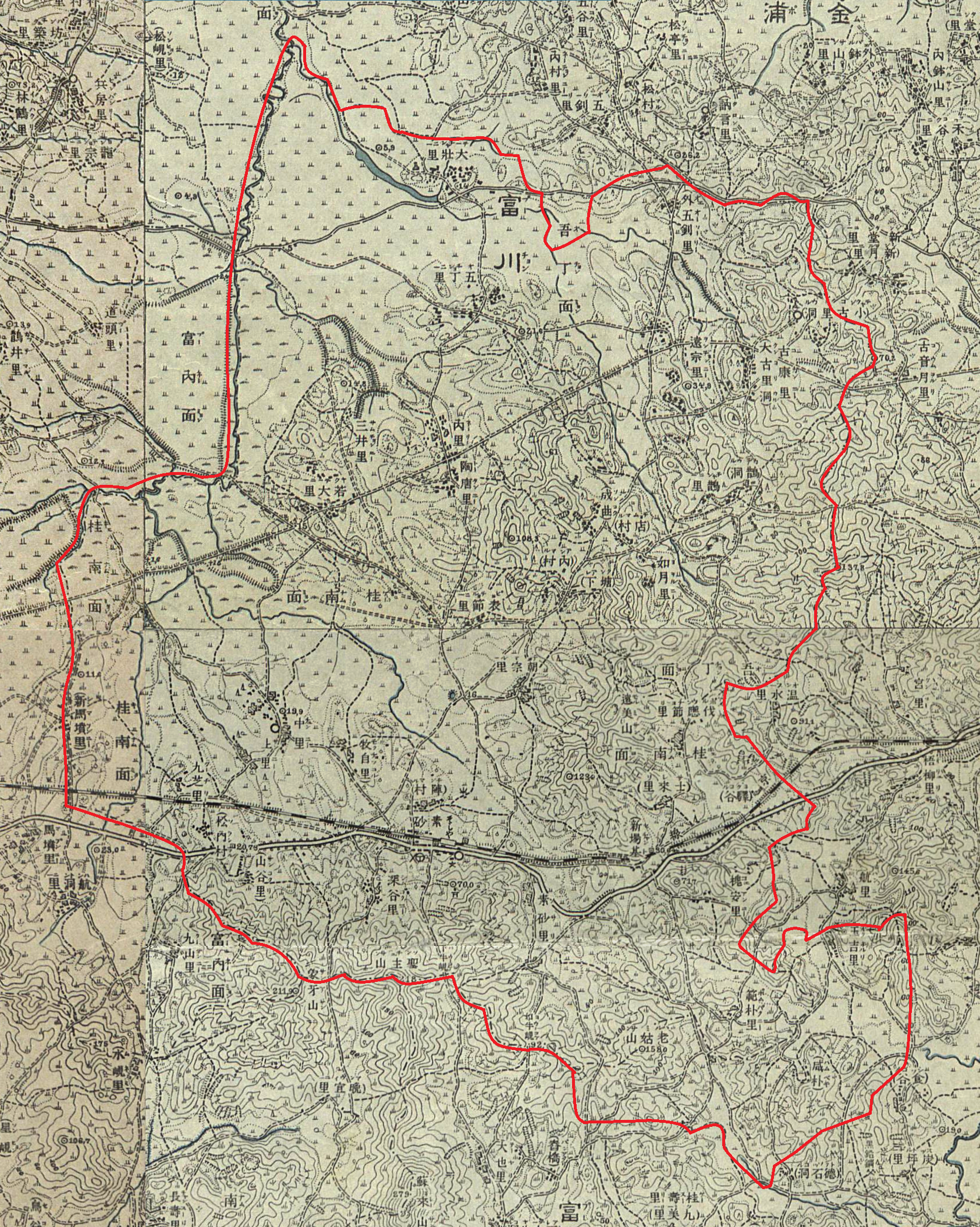 1919년 제작된 부천시 지형도